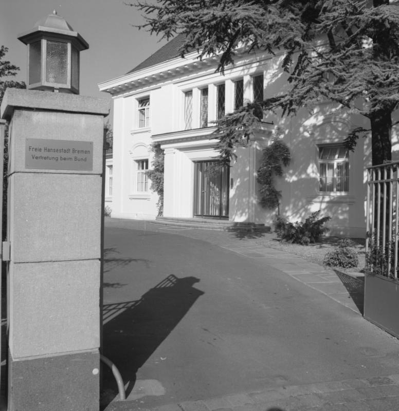 Landesvertretung Bremen (Schaumburg - Lippestr.) Bonn